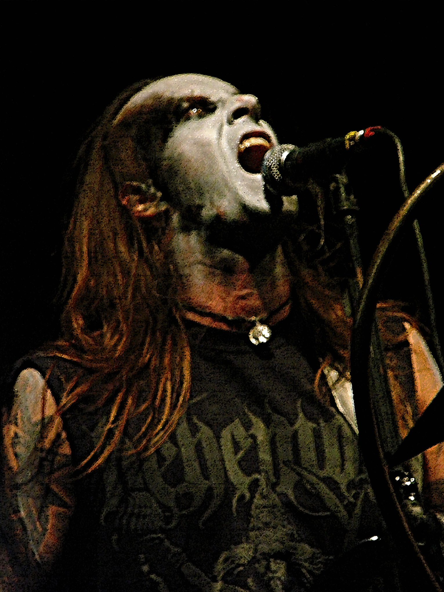 Behemoth en concert à Colfontaine (Belgique), le 07/03/2009: Nergal (Adam Darski).